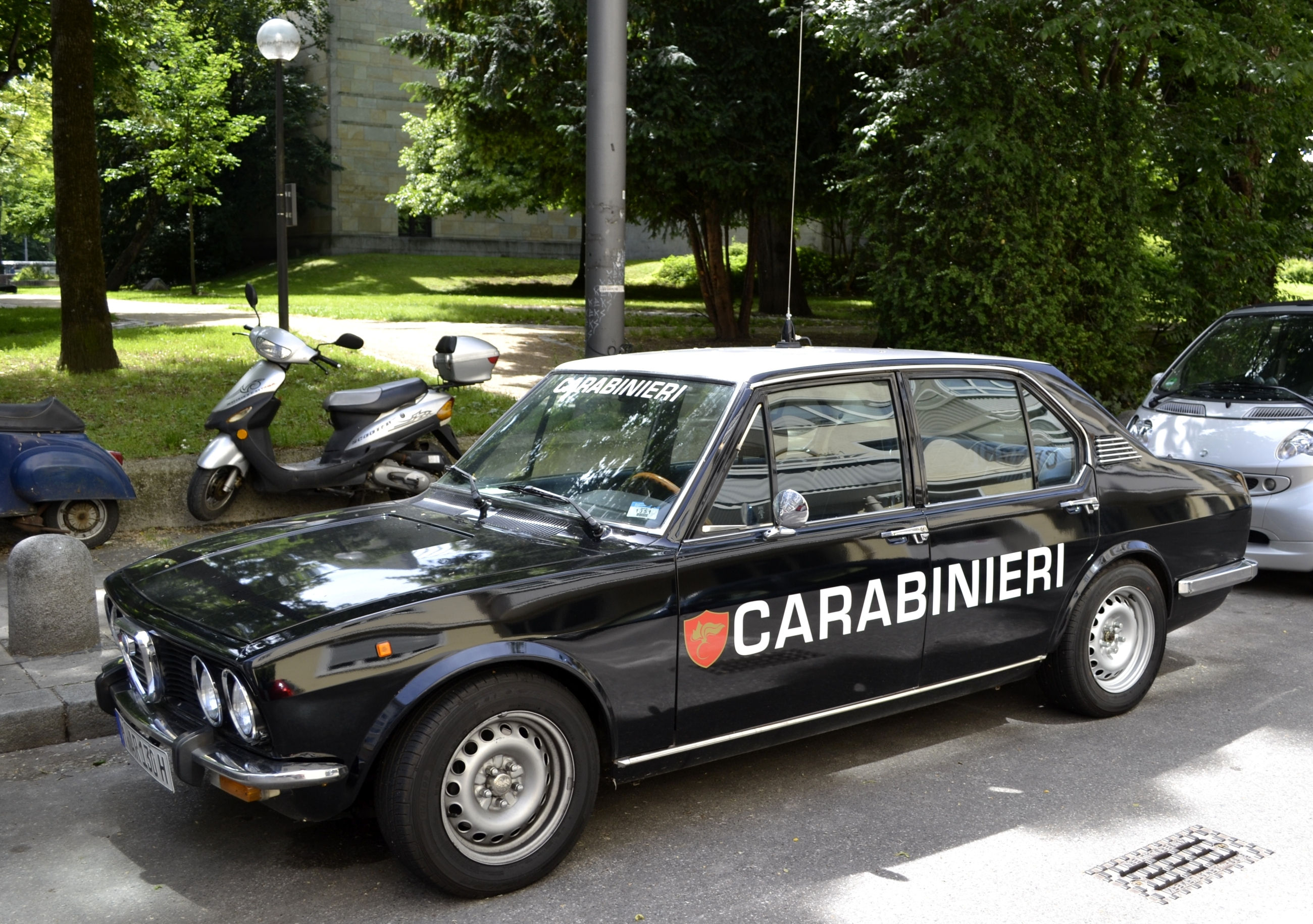 Ein Auto in München, einem italienischen "Carabinieri"-Polizeiwagen nachempfunden.